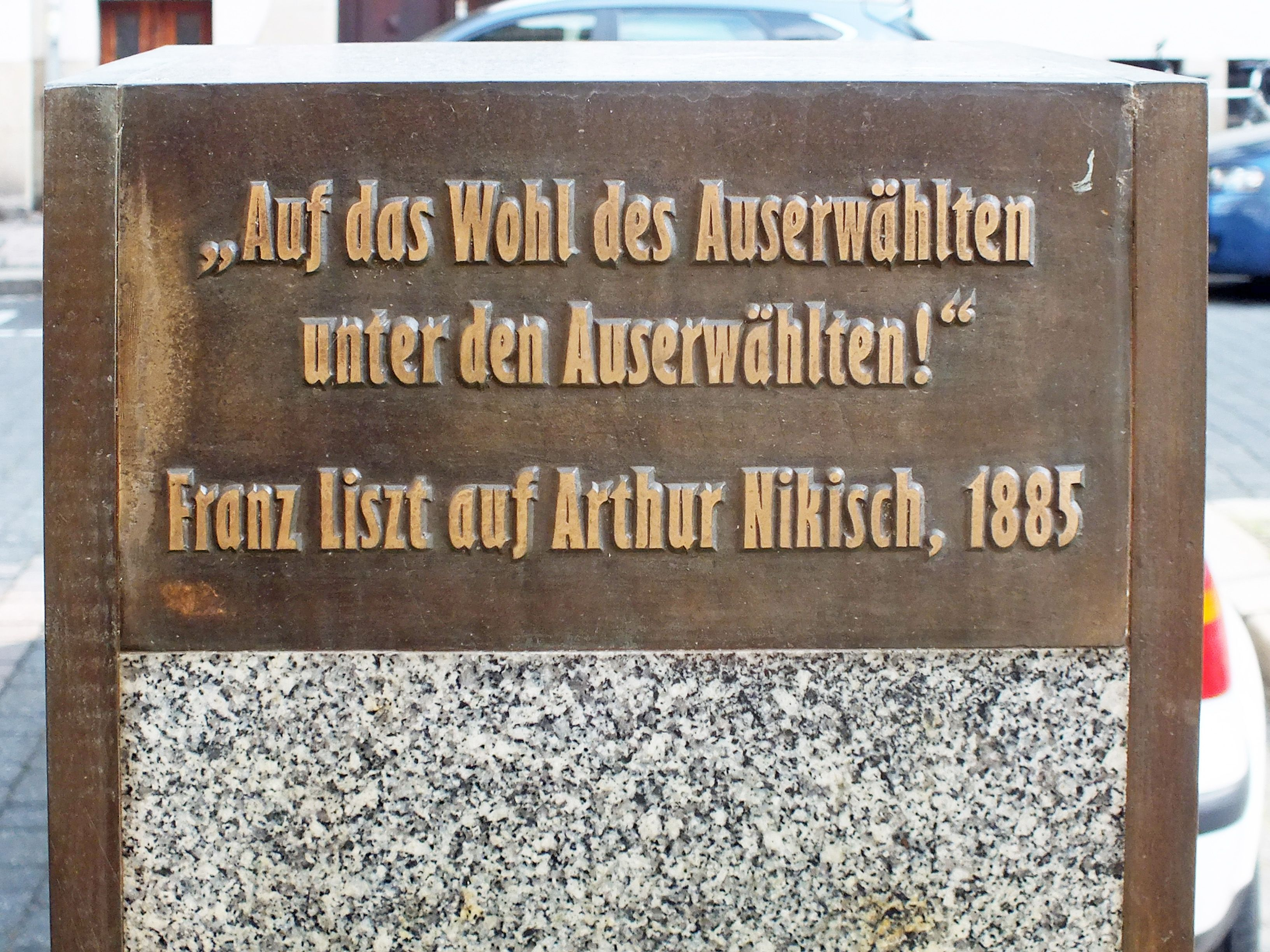 Die Rückseite des Gedenksteins für Arthur Nikisch vor dem Haus Thomasiusstraße 32 (früher 28) am Nikischplatz in Leipzig